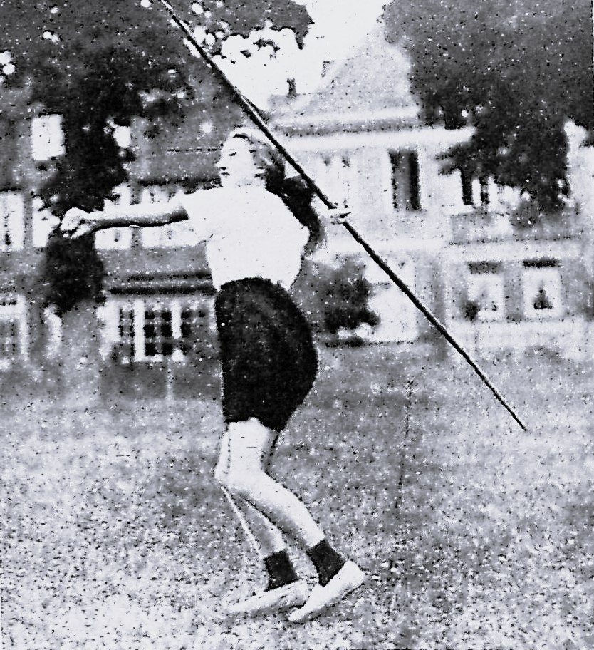 Fräulein G. Hargus verbesserte bei den internationalen Frauenwettkämpfen in Berlin die von der Polin Lonta aufgestellte Weltbestleistung im Sperrwerfen um mehr als 4 Meter auf 37,575 Meter. Die 18jährige Lübeckerin konnte damit den Ruhm für sich in Anspruch nehmen, die jüngste Weltrekordlerin zu sein. Das Bild zeigt sie bei einem Termin auf der Wiese Am Brink.